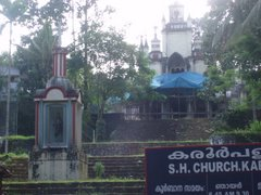 karoor church